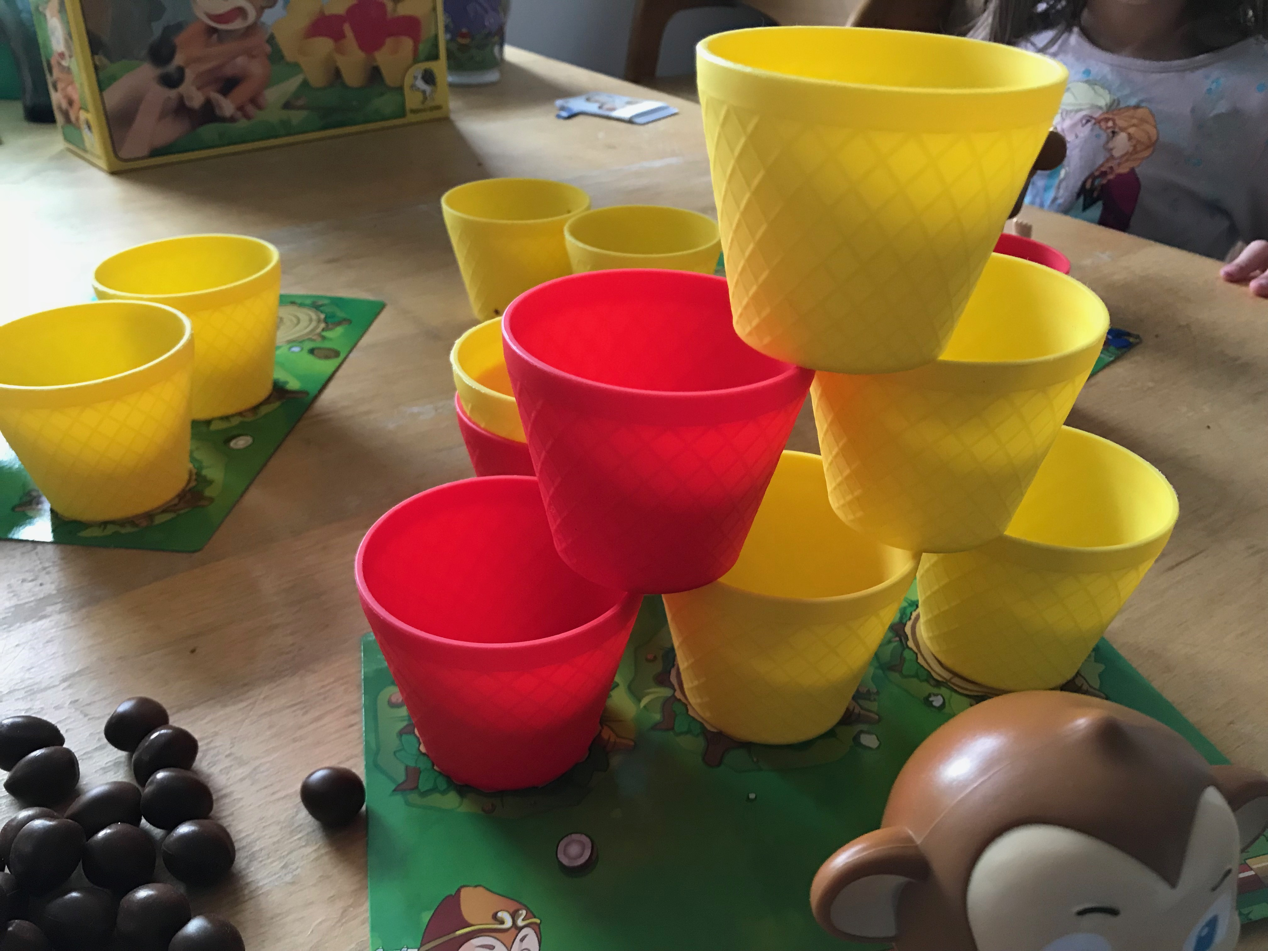 Spielmaterial des Spiels Crazy Coconuts